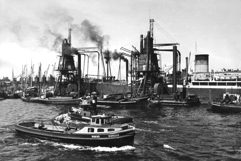 Hafen Hamburg, Getreideschiffe werden gelöscht Illus-dpd Hochbetrieb im Hamburger Hafen Ein amerikanisches Getreideschiff ist eingetroffen und wird mit Saughebern sofort gelöscht. 24-5-48 [Herausgabedatum] 1547-48